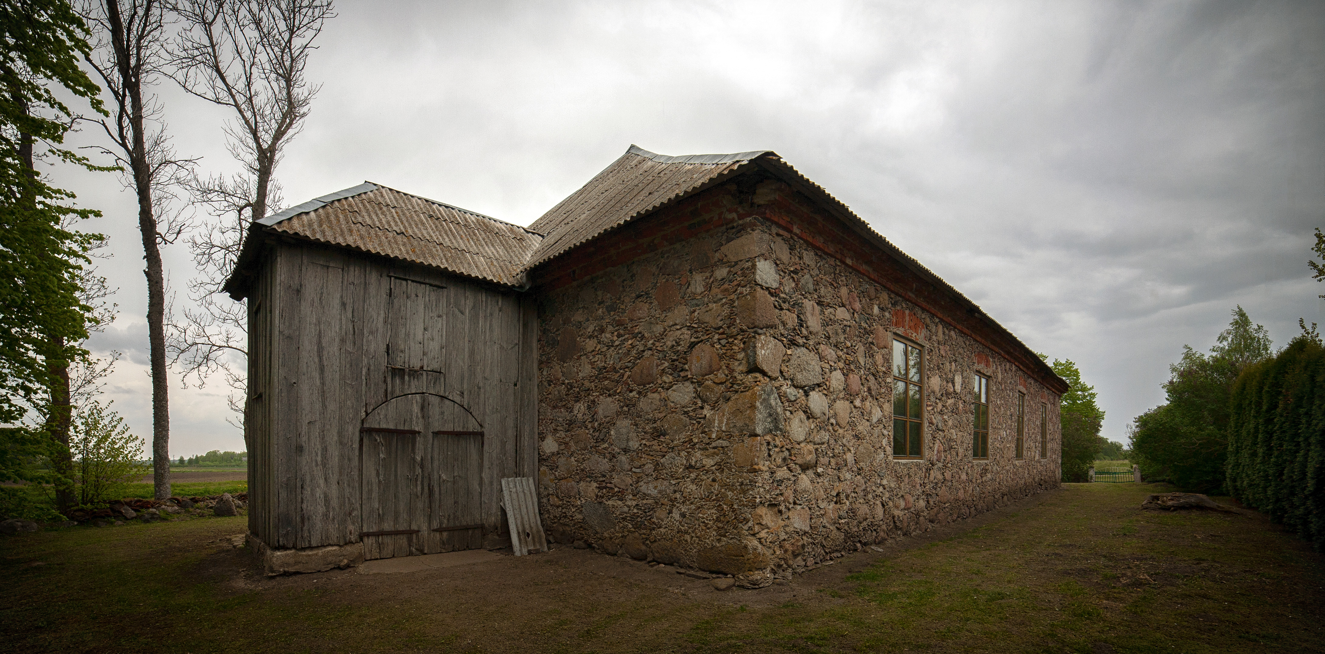 Saraiķu luterāņu baznīca